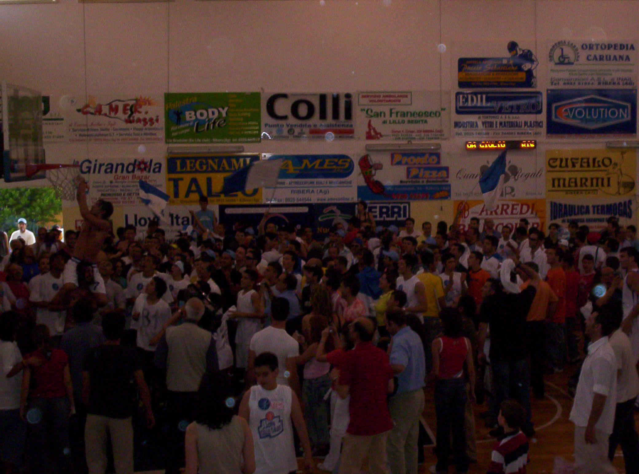 Festa per la promozione dell'Ares Ribera in serie B1